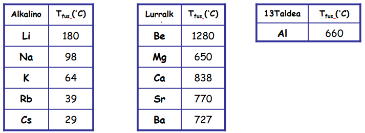 Metalen fusio puntuak